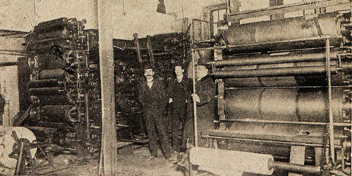 Rotativas de la imprenta del diario chileno "El Ferrocarril" en 1910